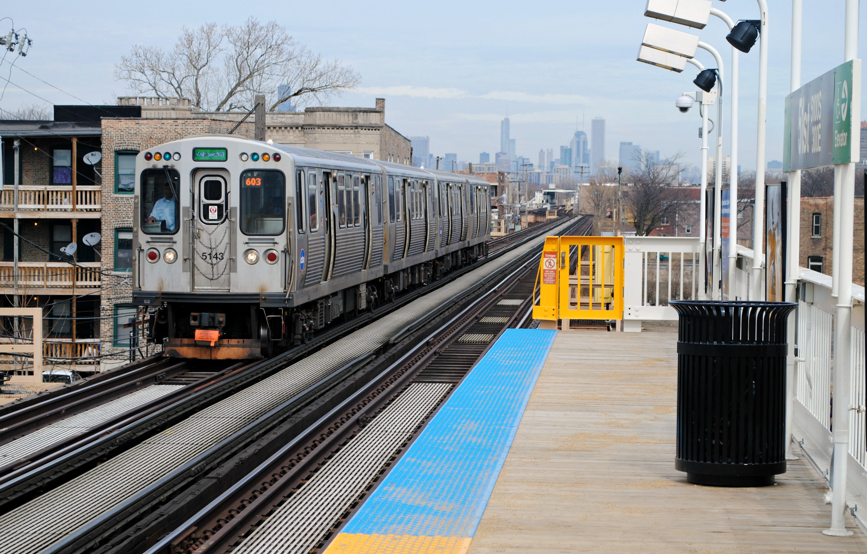 Chicago, Illinois